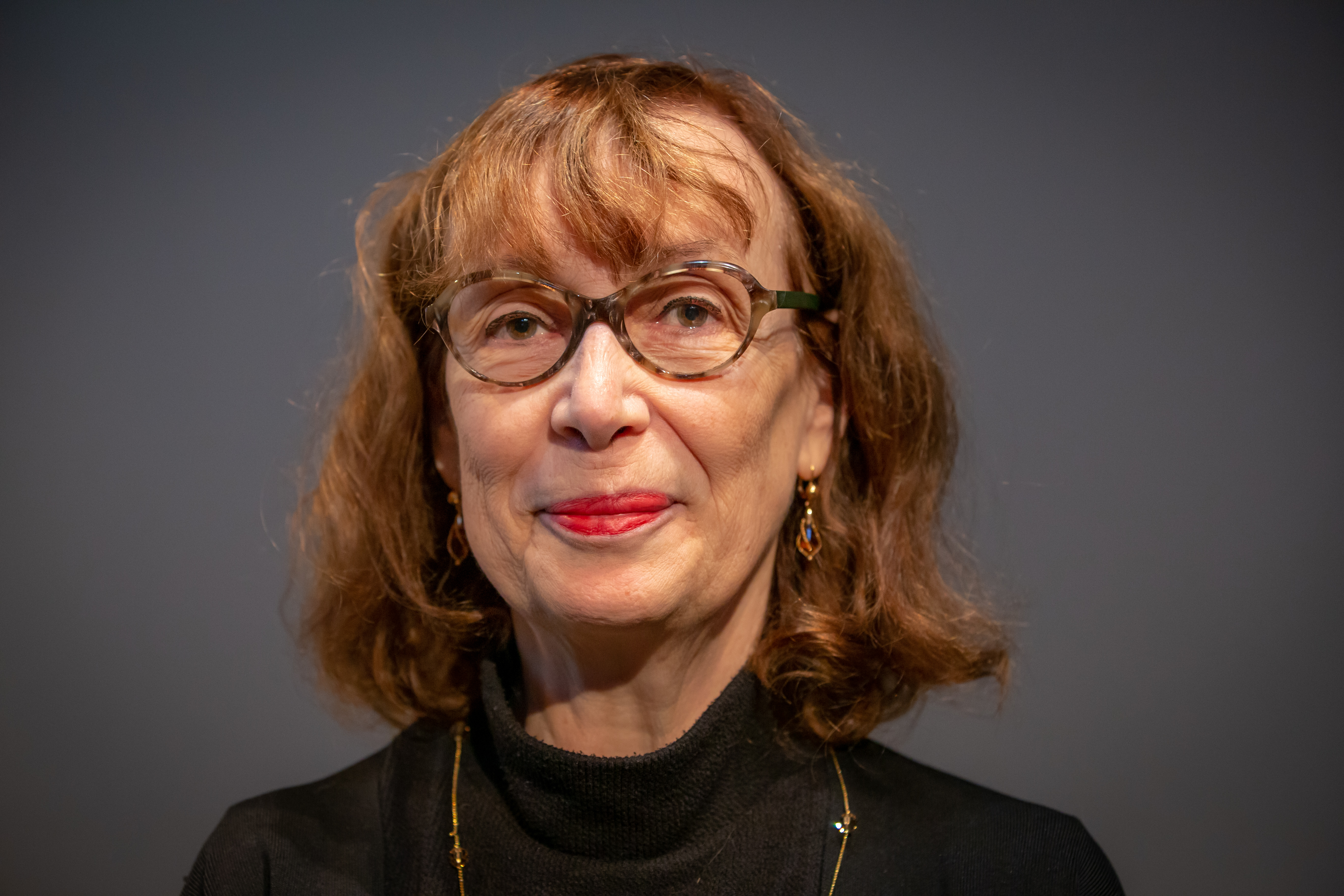 Carole David après avoir remporté le Grand Prix du livre de Montréal 2019.